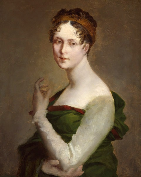 Portrait (inachevé?) de Josephine de Beauharnais (1763-1814)